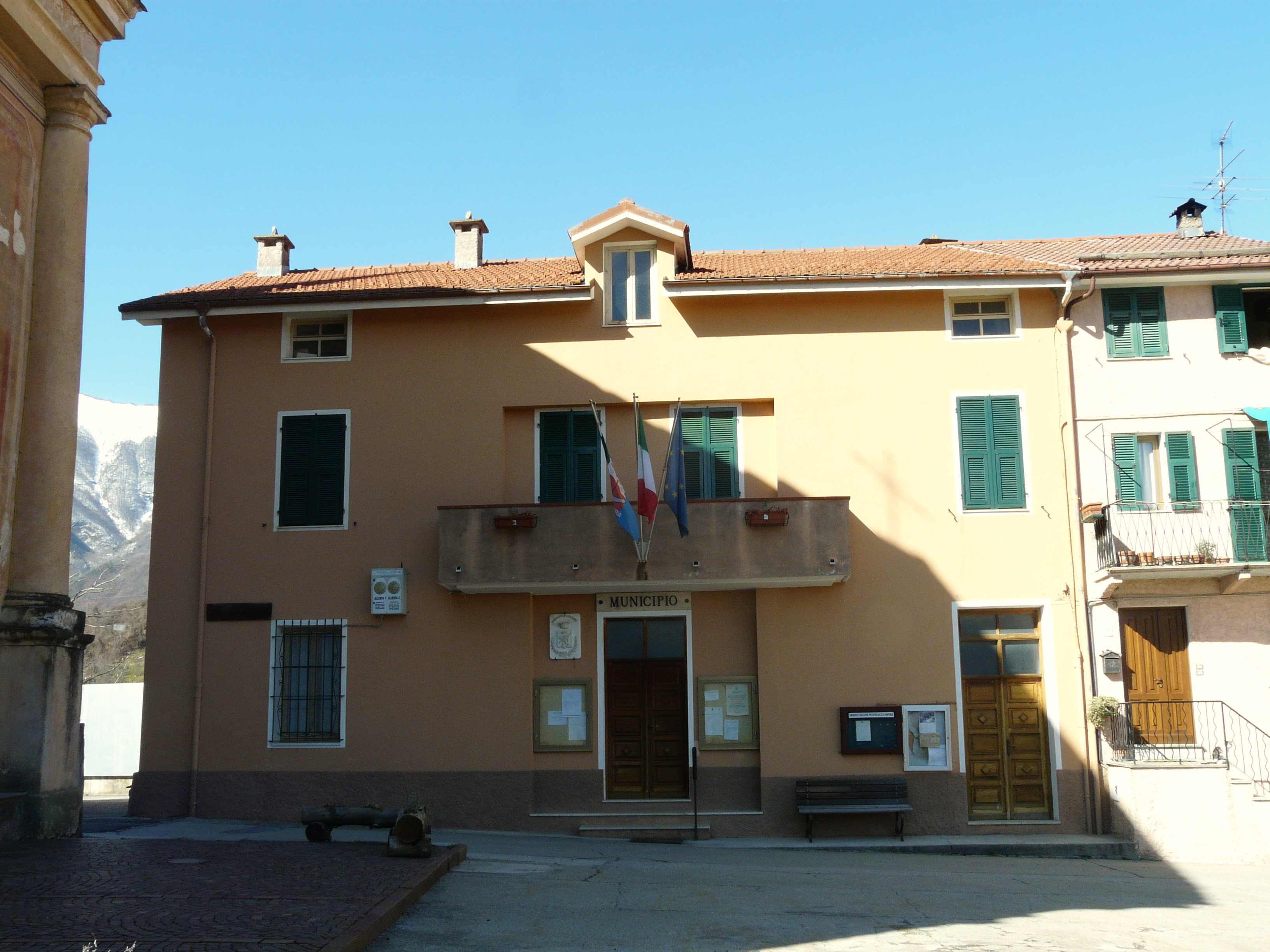 Municipio di Cosio di Arroscia, Liguria, Italia